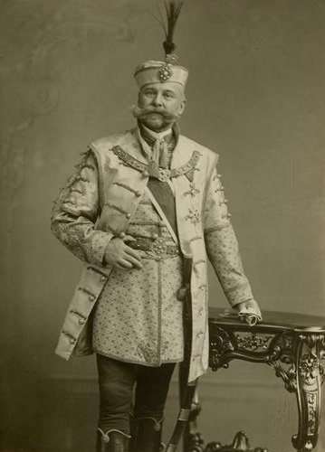 Bánffy Dezső korábbi miniszterelnök Szenes, Koller utódja fényképén